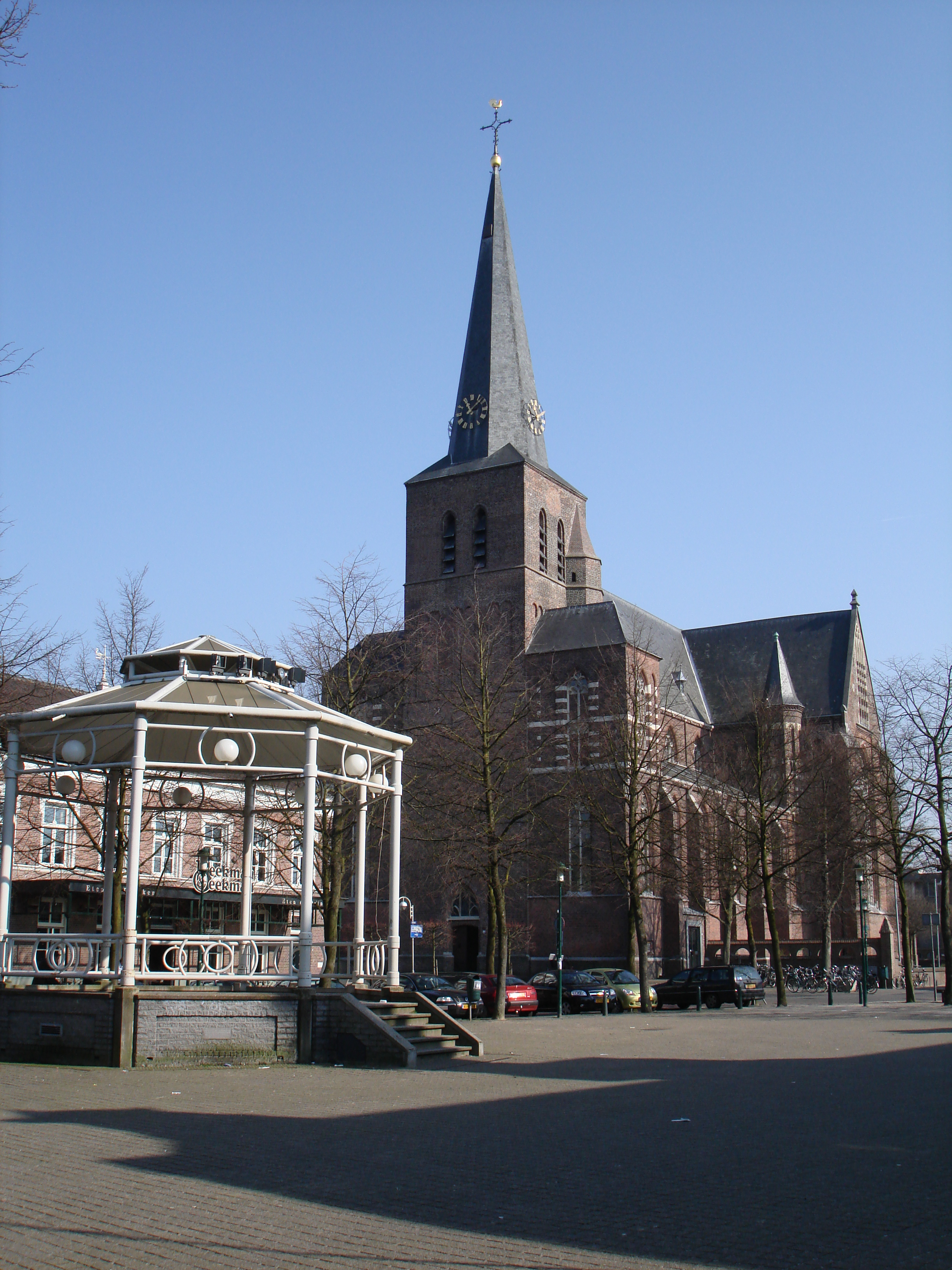 Foto zelf gemaakt op 25 maart 2007. Keunen